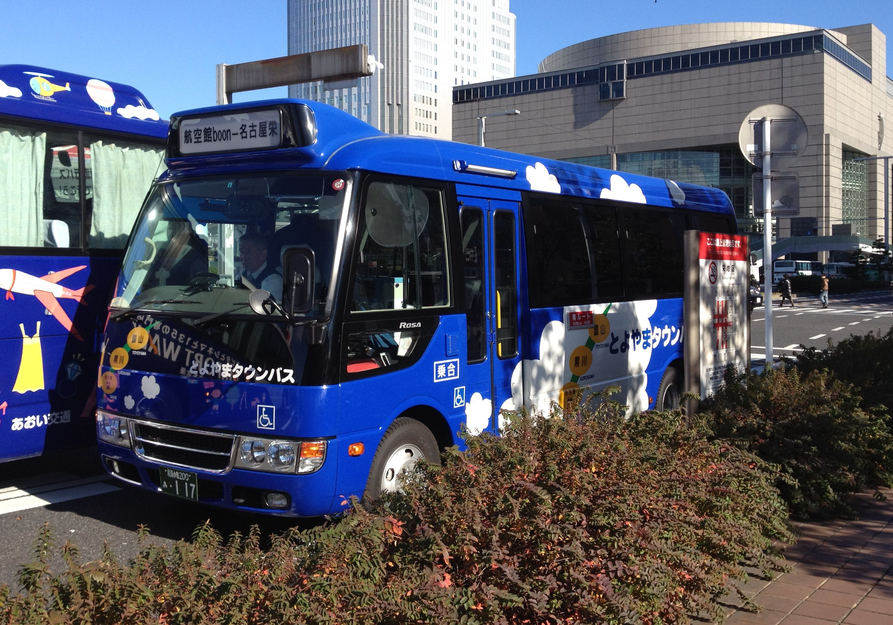 とよやまタウンバス。名古屋栄にて2011年12月23日に撮影。